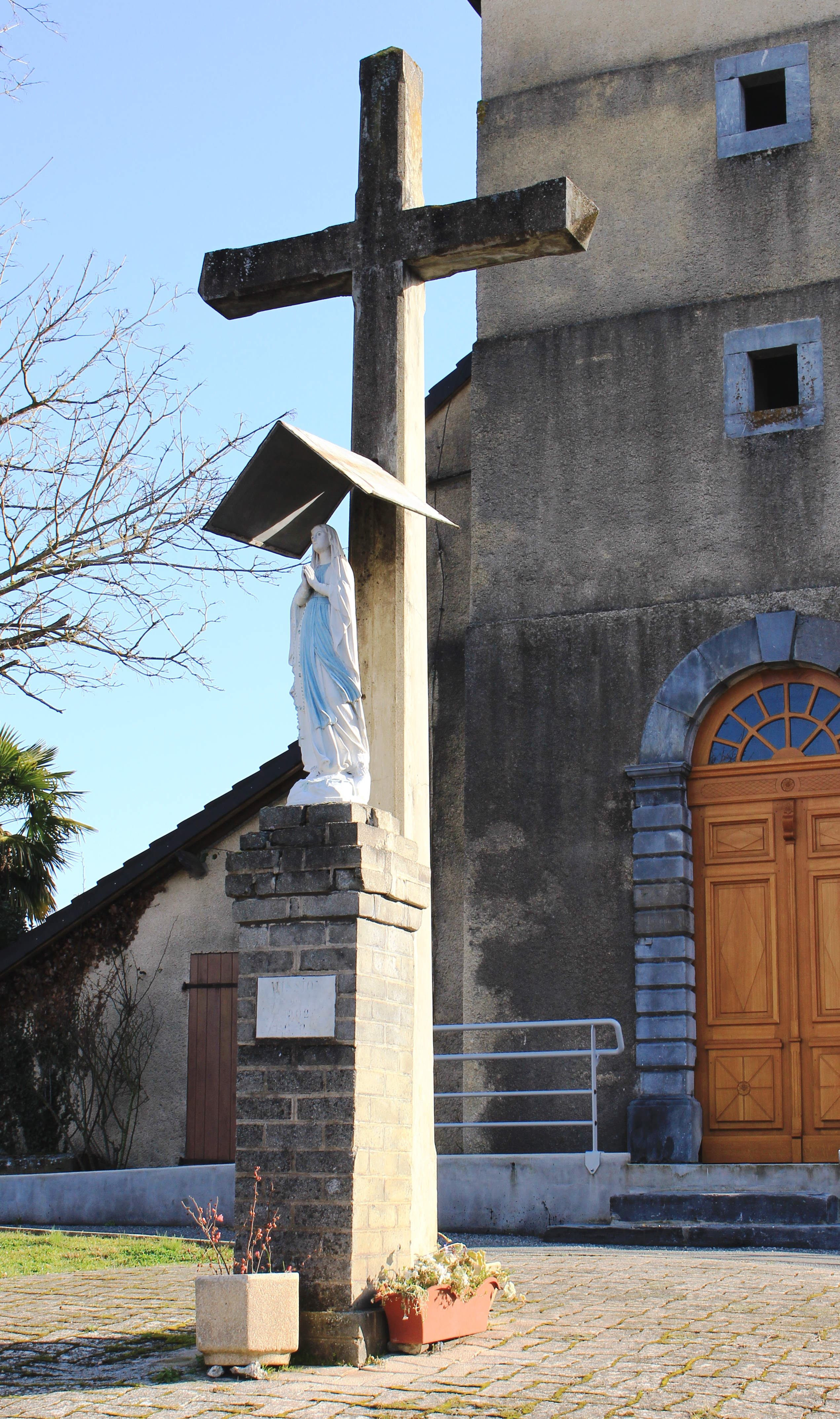 Croix de Marseillan (Hautes-Pyrénées)